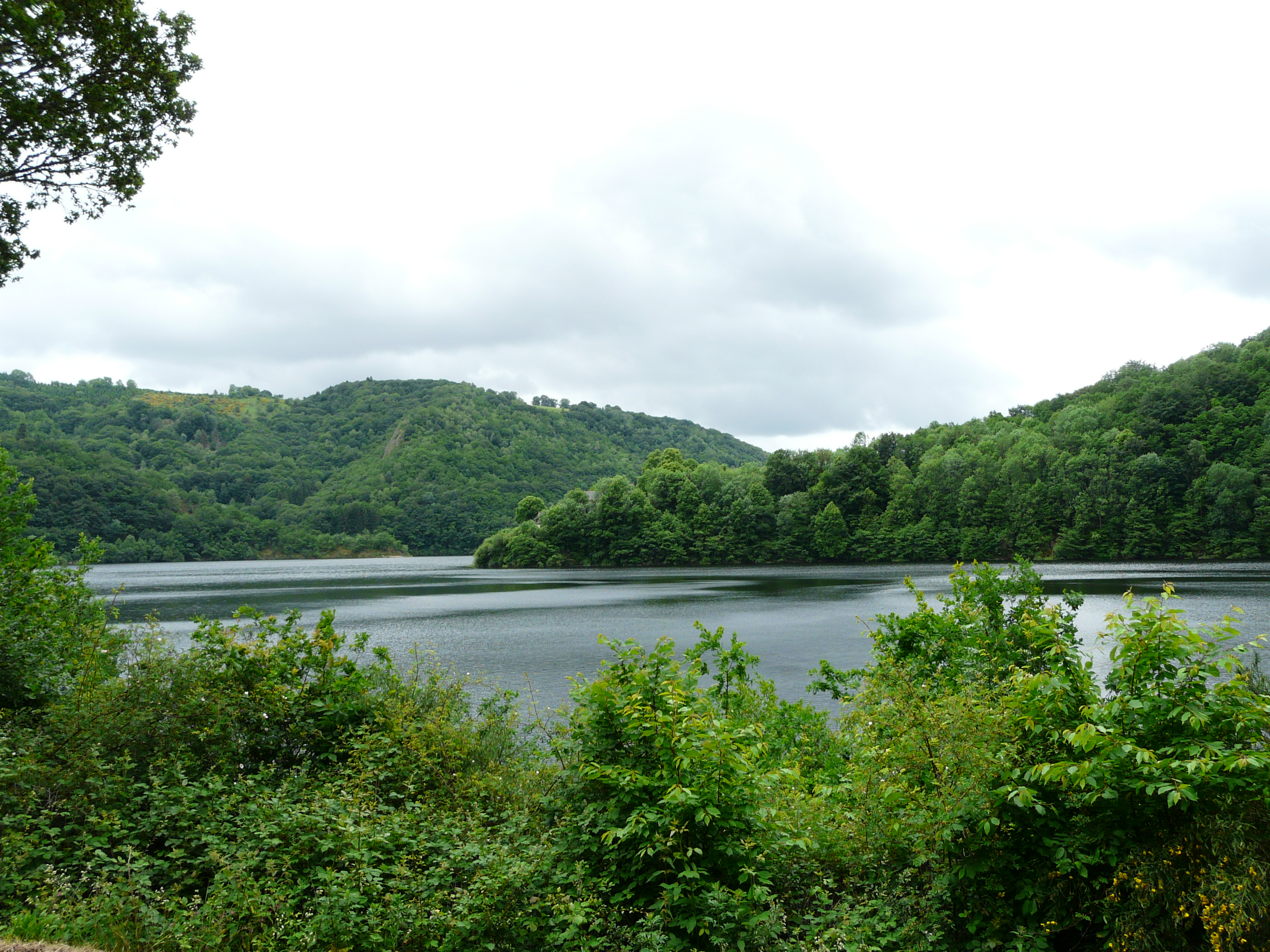 Le lac de Bort-les-Orgues vu depuis le nord, entre les communes de Larodde (Puy-de-Dôme, Auvergne, au premier plan) et Confolent-Port-Dieu (Corrèze, Limousin, à l'arrière plan).